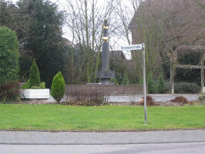 Königshoven, Dorfbrunnen